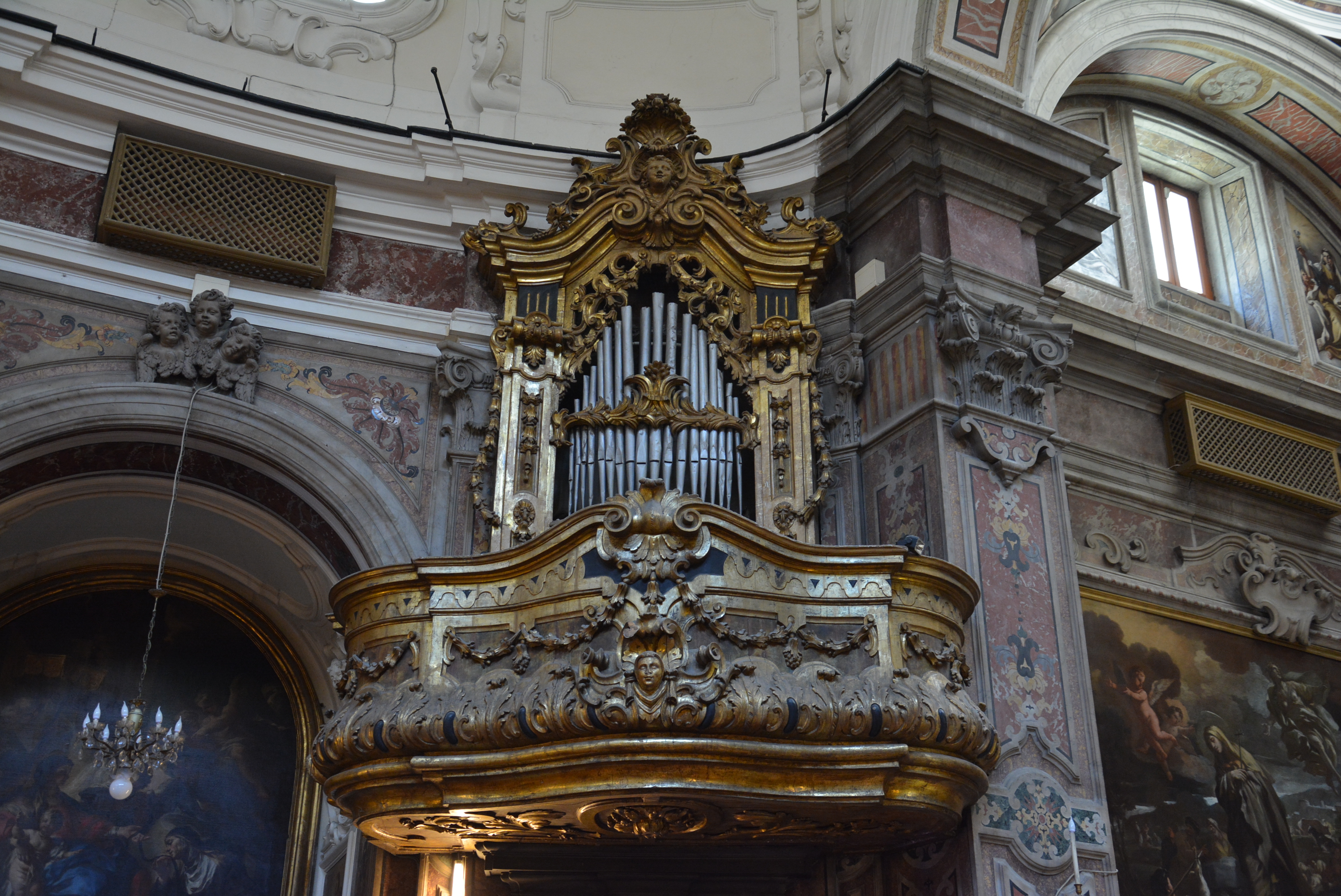 Chiesa di Santa Maria Egiziaca a Forcella a Napoli